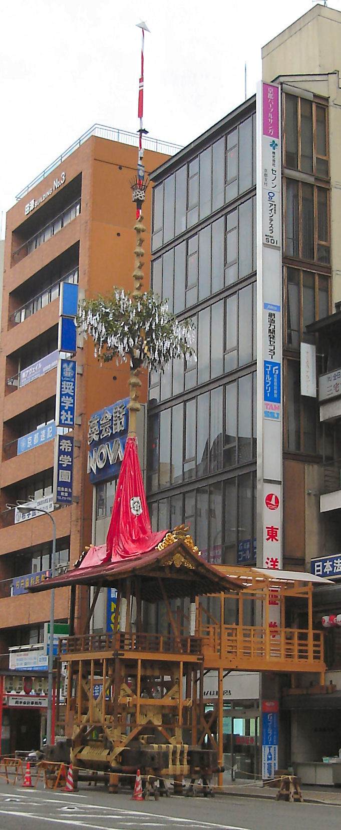 KankoBoko hokotate(函谷鉾 鉾建て), Kyoto,Japan